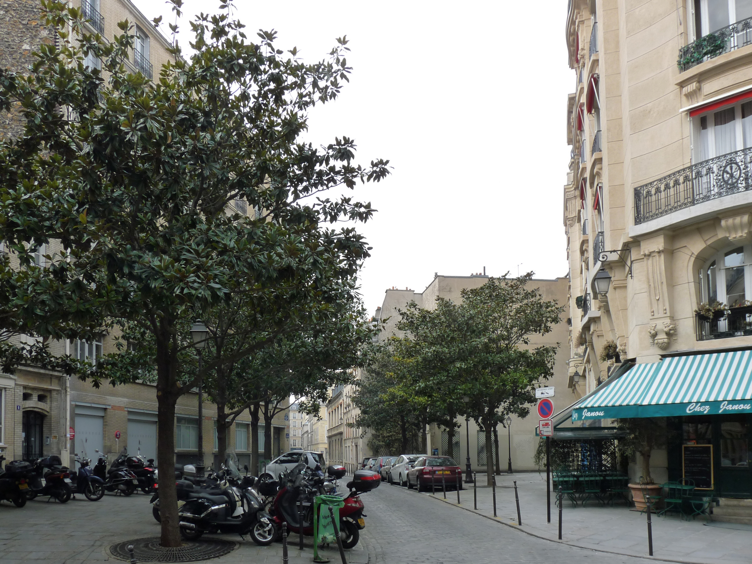 La rue Roger Verlomme à Paris, vue depuis la rue du Béarn